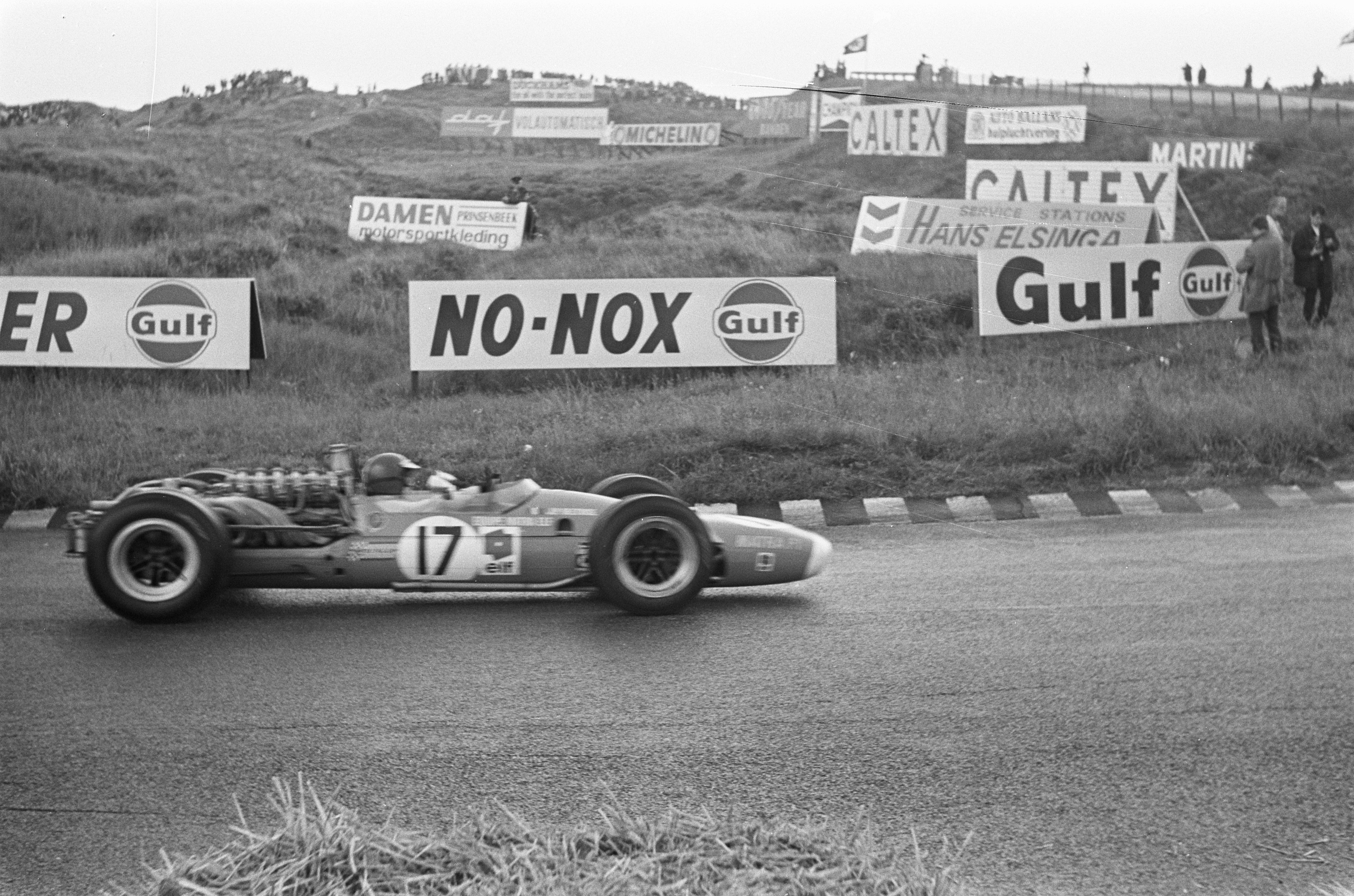 Grand Prix 68 Zandvoort . Nummers 9.10 Jean Beltoise.